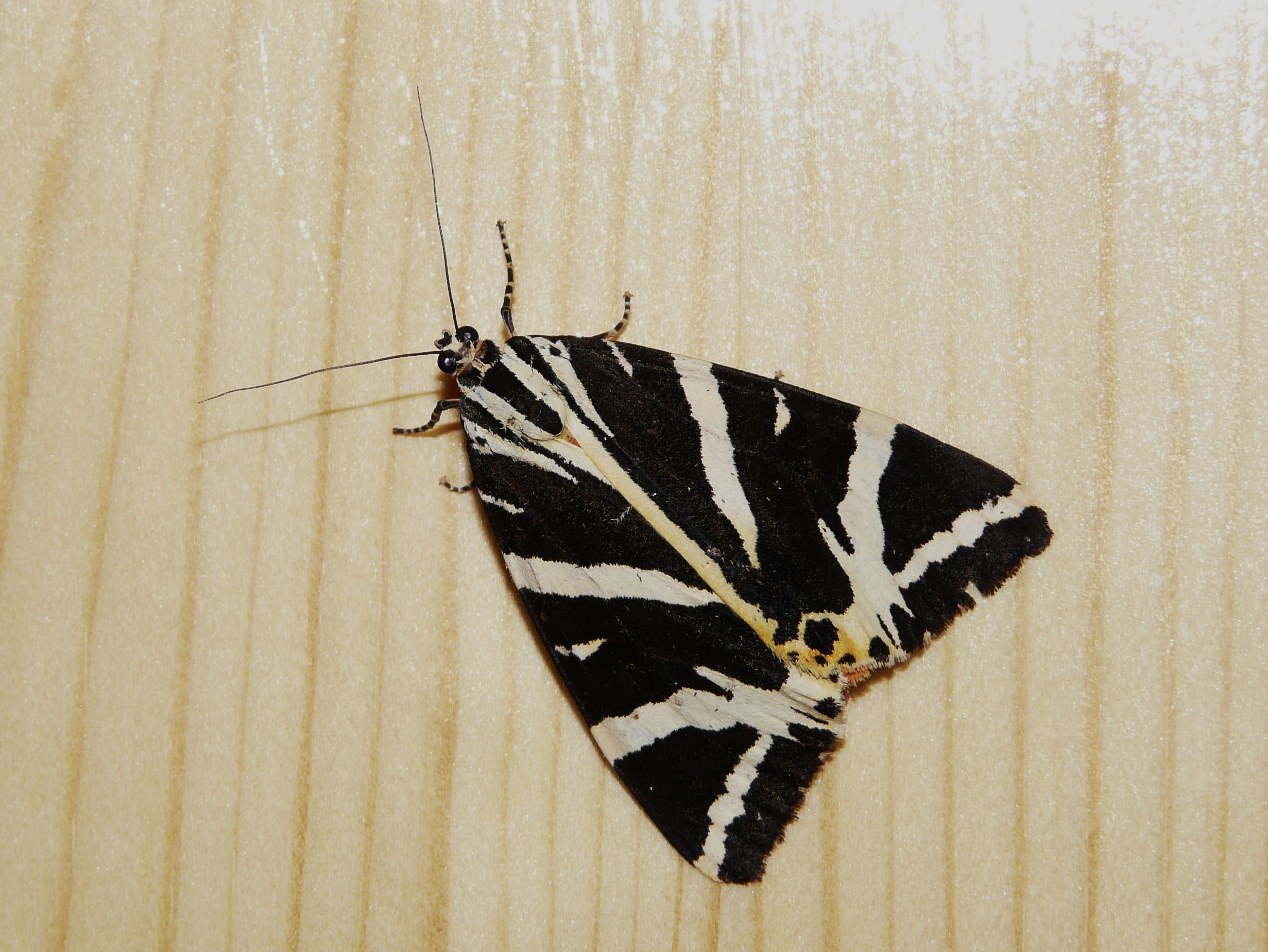 Écaille chinée, (Euplagia quadripunctaria), Périgueux, Dordogne, France